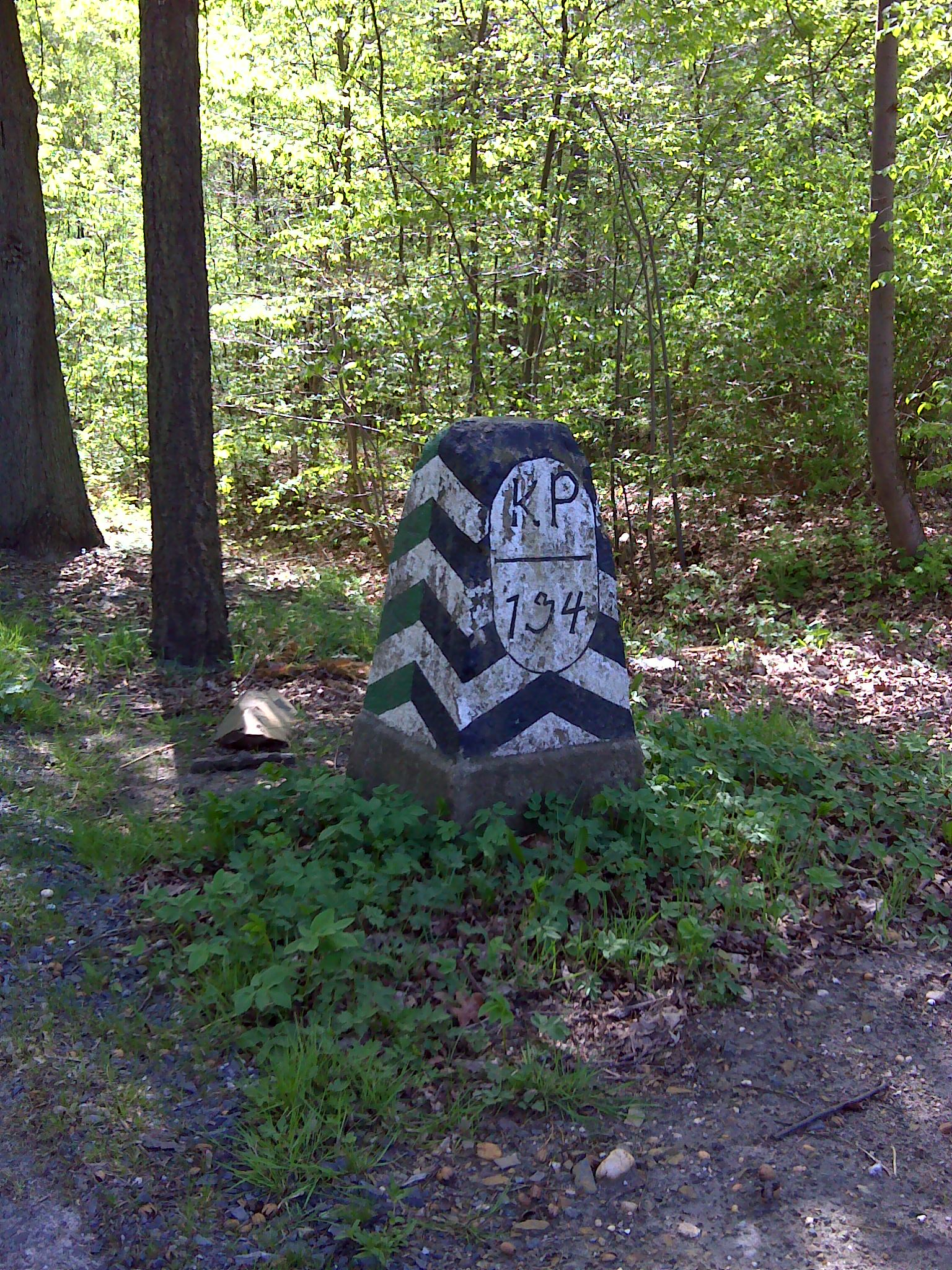 Historischer Grenzstein Nr. 134 der sächsisch-preußischen Grenze 1815 Hornjoserbsce: Historiski saksko-pruski měznik čo. 134 při dróze mjez Njedźichowom a Nadróznej Hrabowku